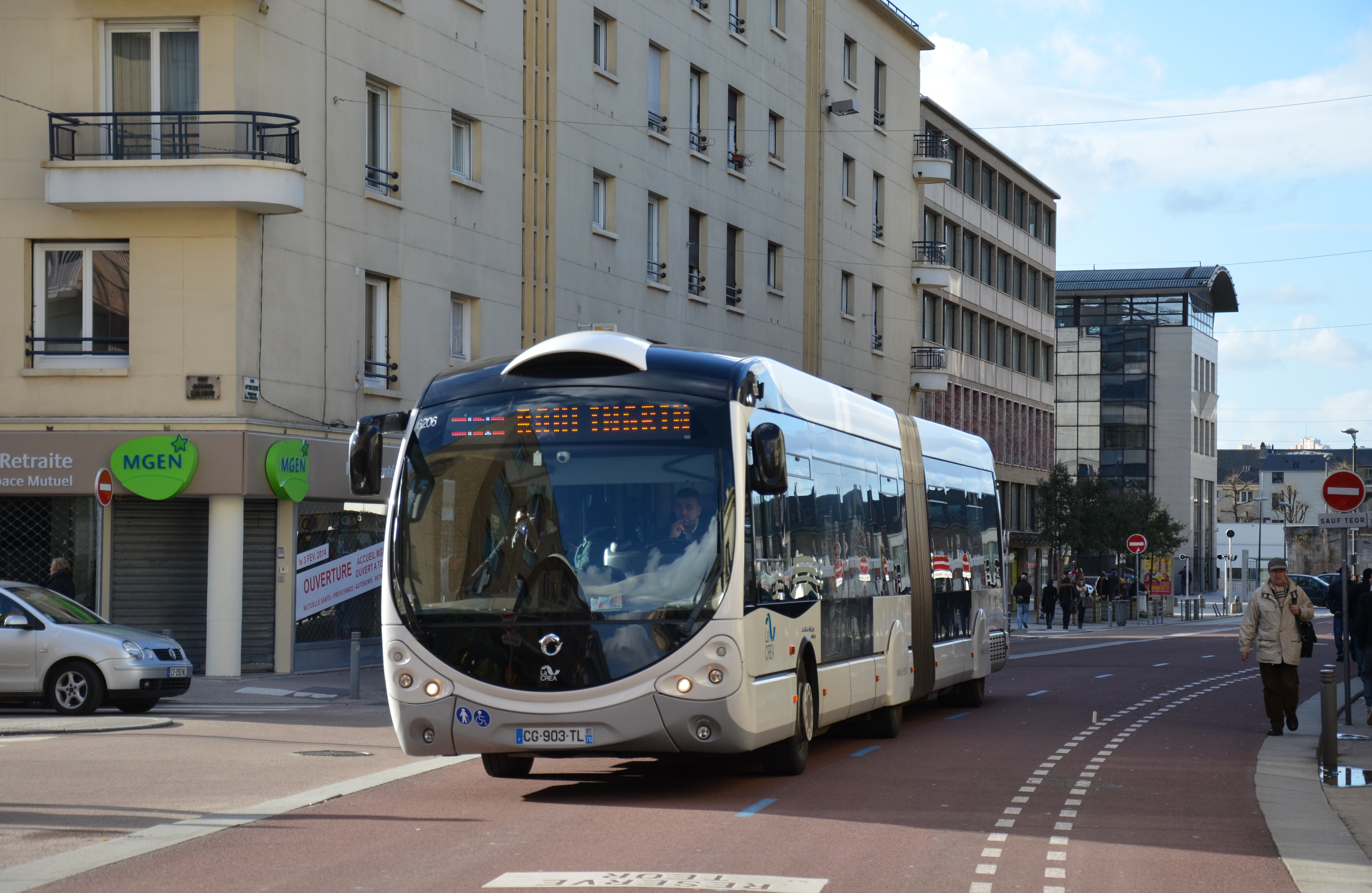 Irisbus Crealis Neo 18 n°6206 sur la ligne T1 TEOR près de Théâtre des Arts, du réseau ASTUCE de Rouen